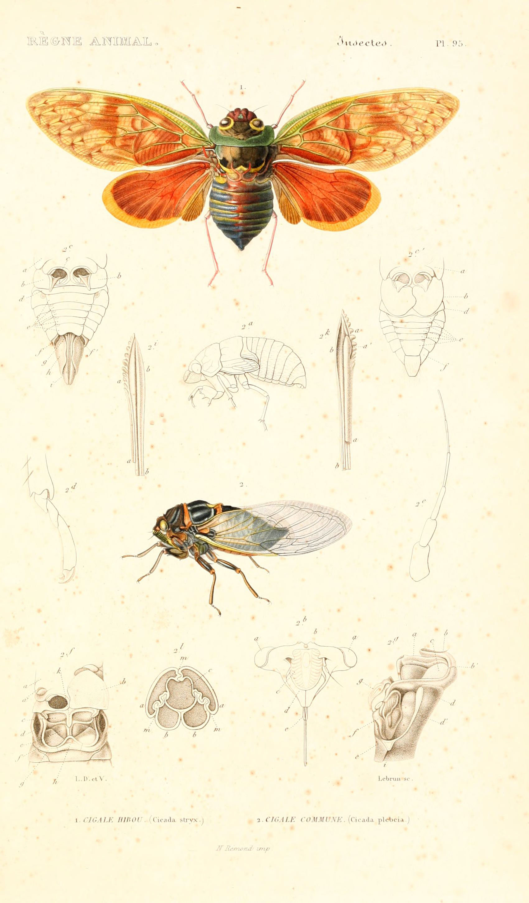 Règne Animal - Insectes - Pl. 95 1. CIGALE HIBOU (Cicada Stryx) 2. CIGALE COMMUNE (Cicada plebeia) N Rémond imp